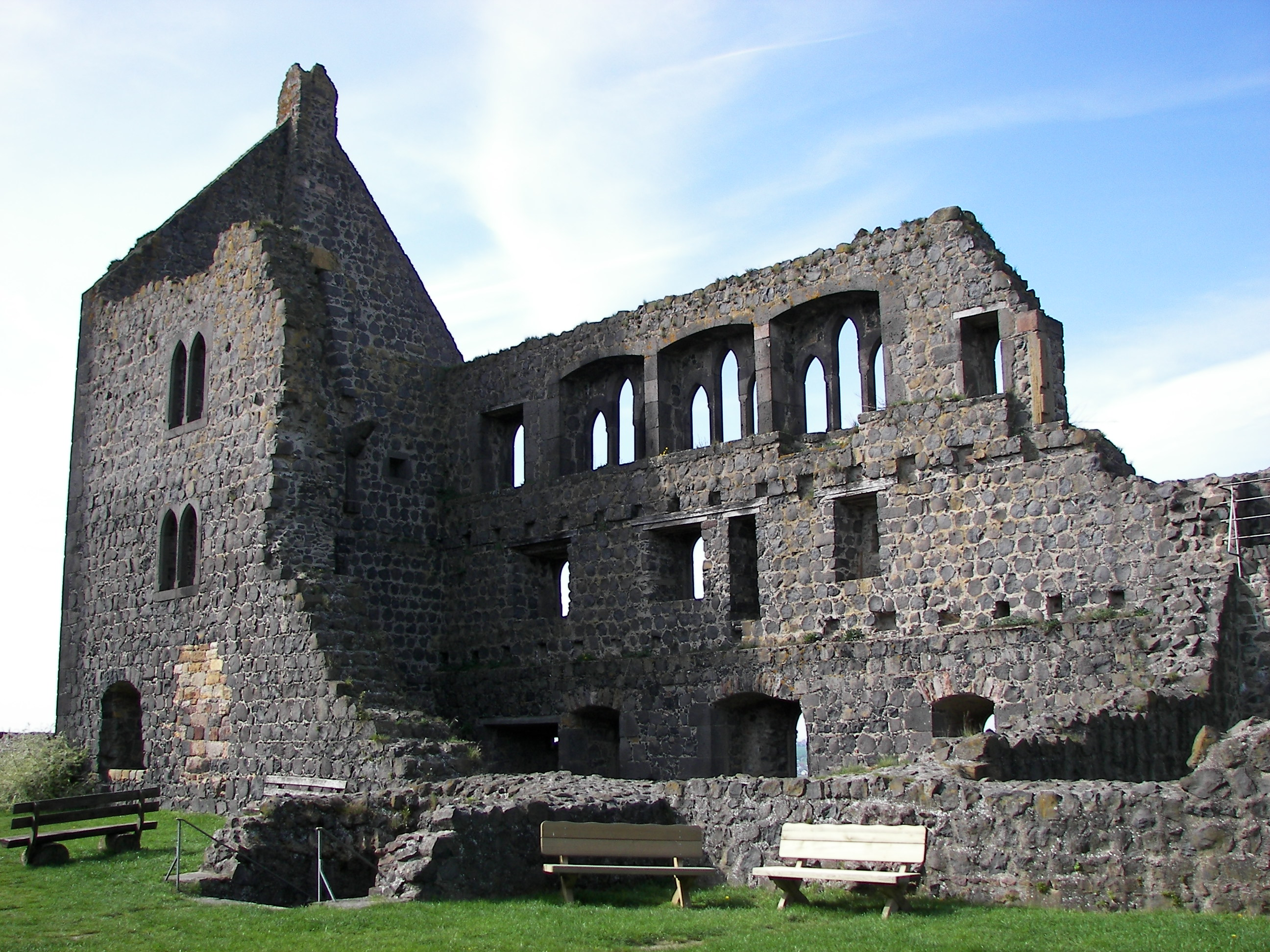 Burg Münzenberg, Falkensteiner Palas, selbst fotografiert